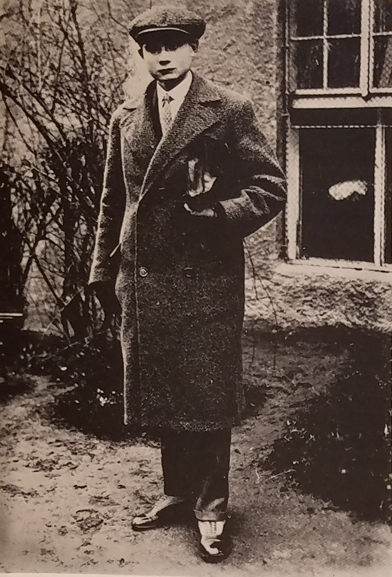 Мікола Гарошка. Прага, 1923 г.